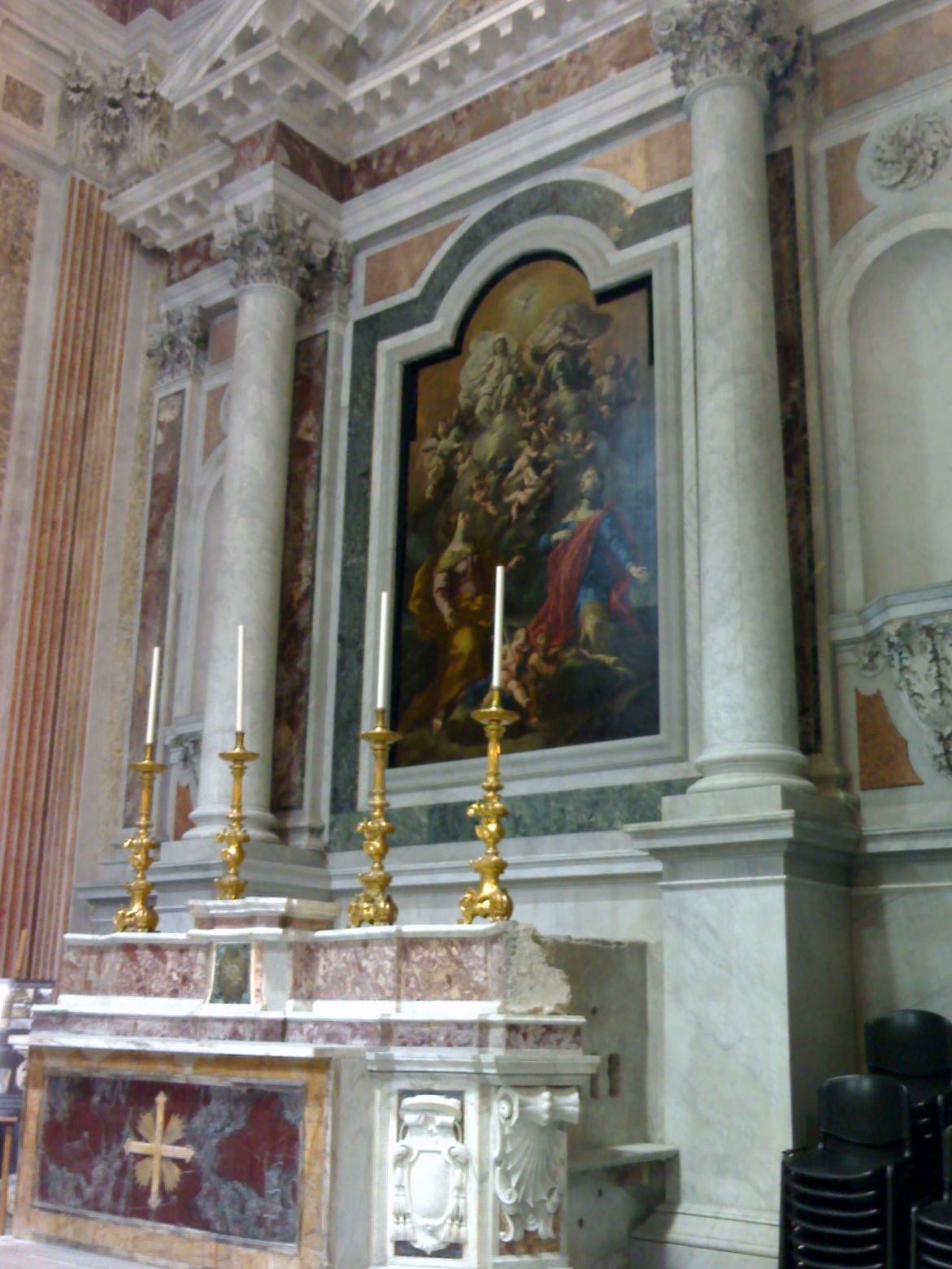 Chiesa di San Giovanni Maggiore di Napoli - Cappellone Santalucia